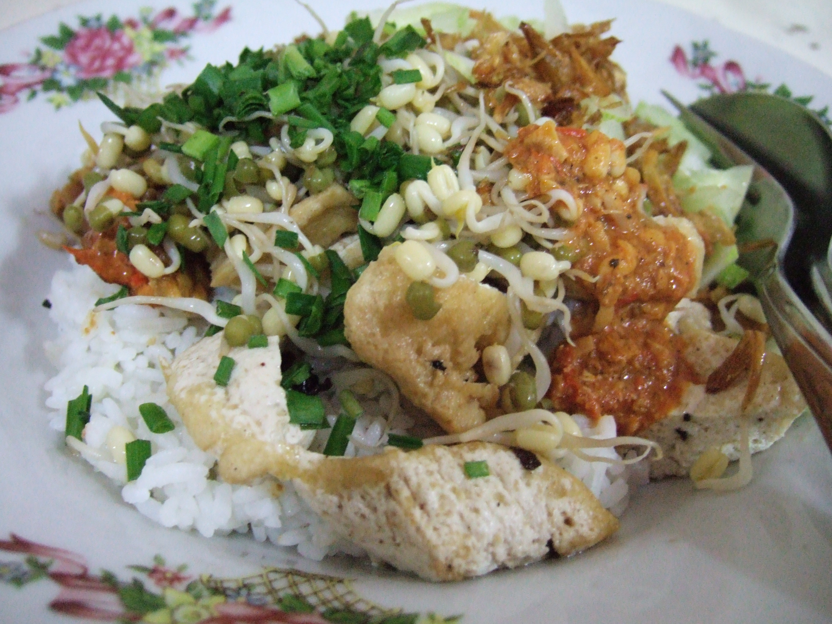 Nasi Lengko (Sega Lengko) of Cirebon, West Java, Indonesia. Vegetarian rice with tofu and beansprout. チルボンのナシ・レンコ.ご飯の上に豆腐ともやしを載せ、ピーナッツソースとケチャップマニスをかけたもの。